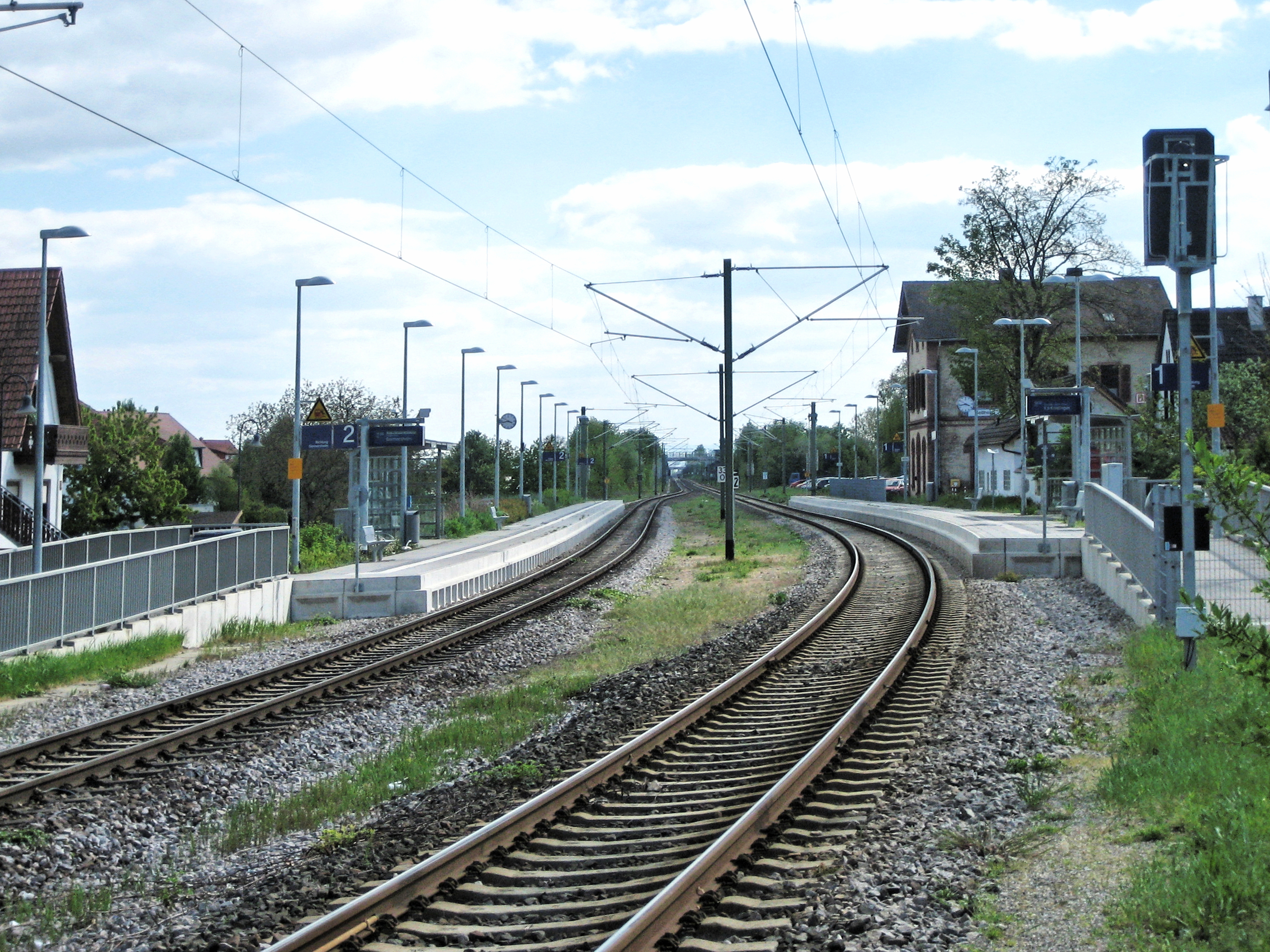 Bahnhof Bellheim